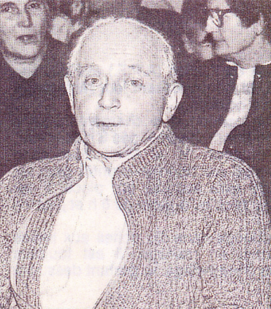 Abbé Pierre Maillard, curé administrateur de la paroisse de Bleurville (1993-1994) puis curé de la grande paroisse Notre-Dame de la Saône jusqu'en 2005